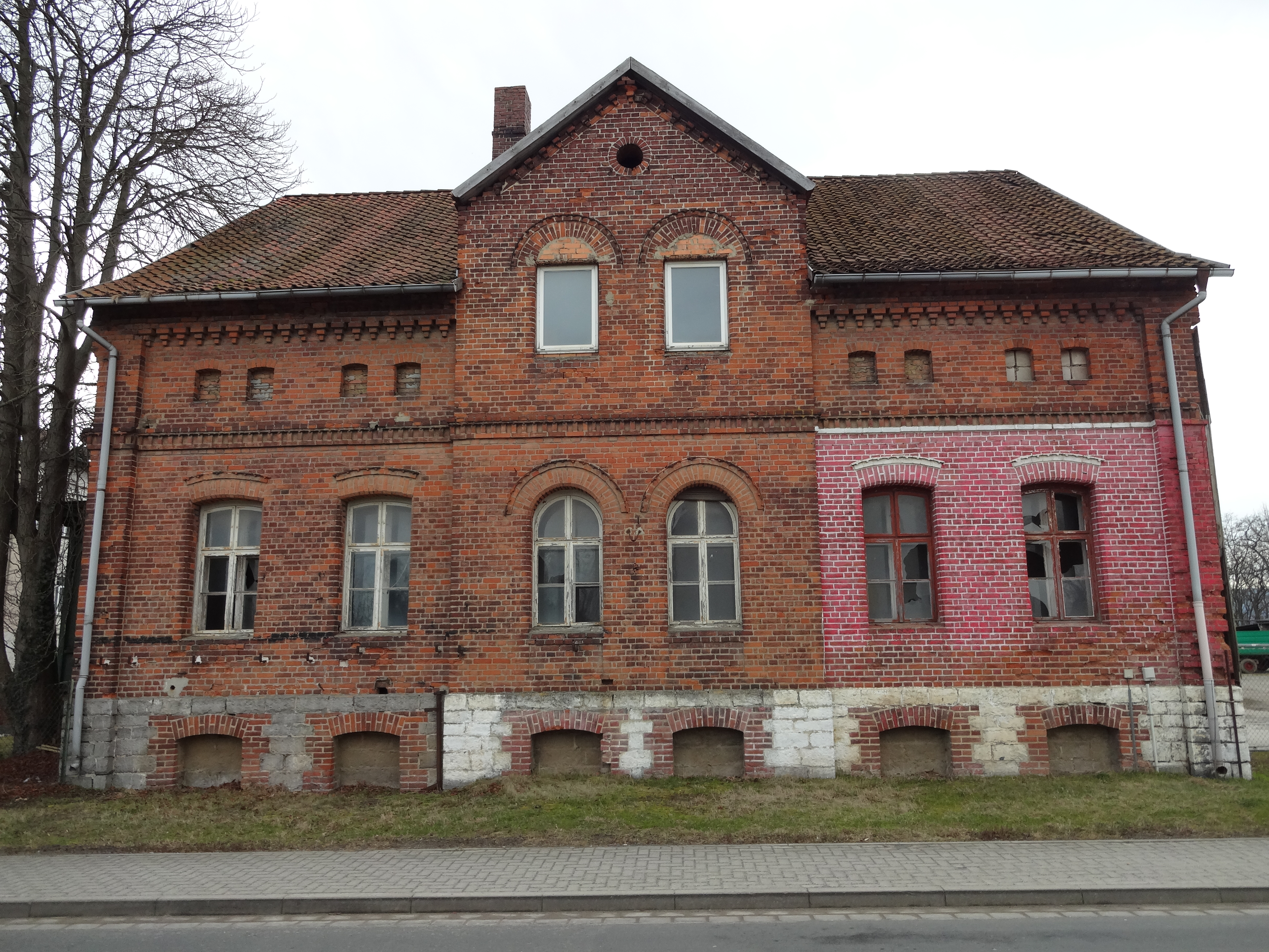 Kulturdenkmal in Minsleben, Ortsteil von Wernigerode